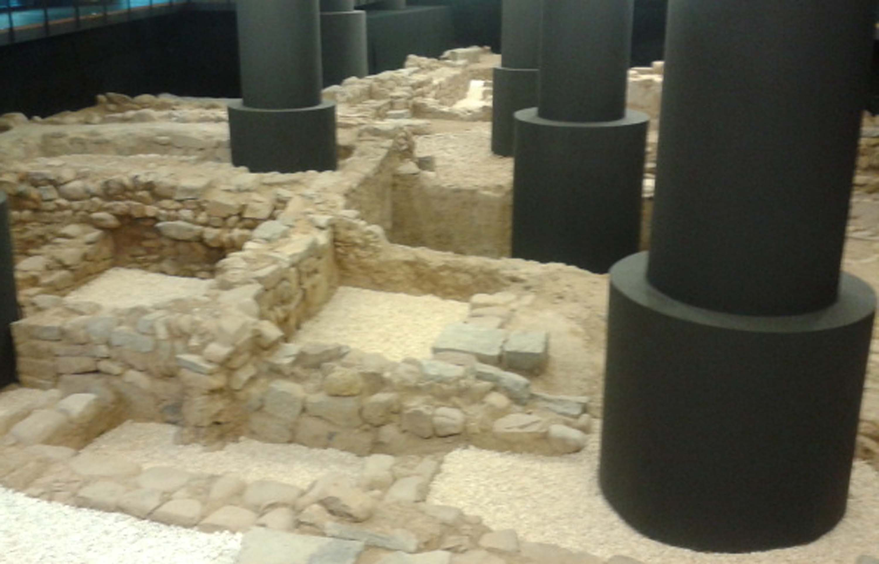 Estructuras de origen medieval